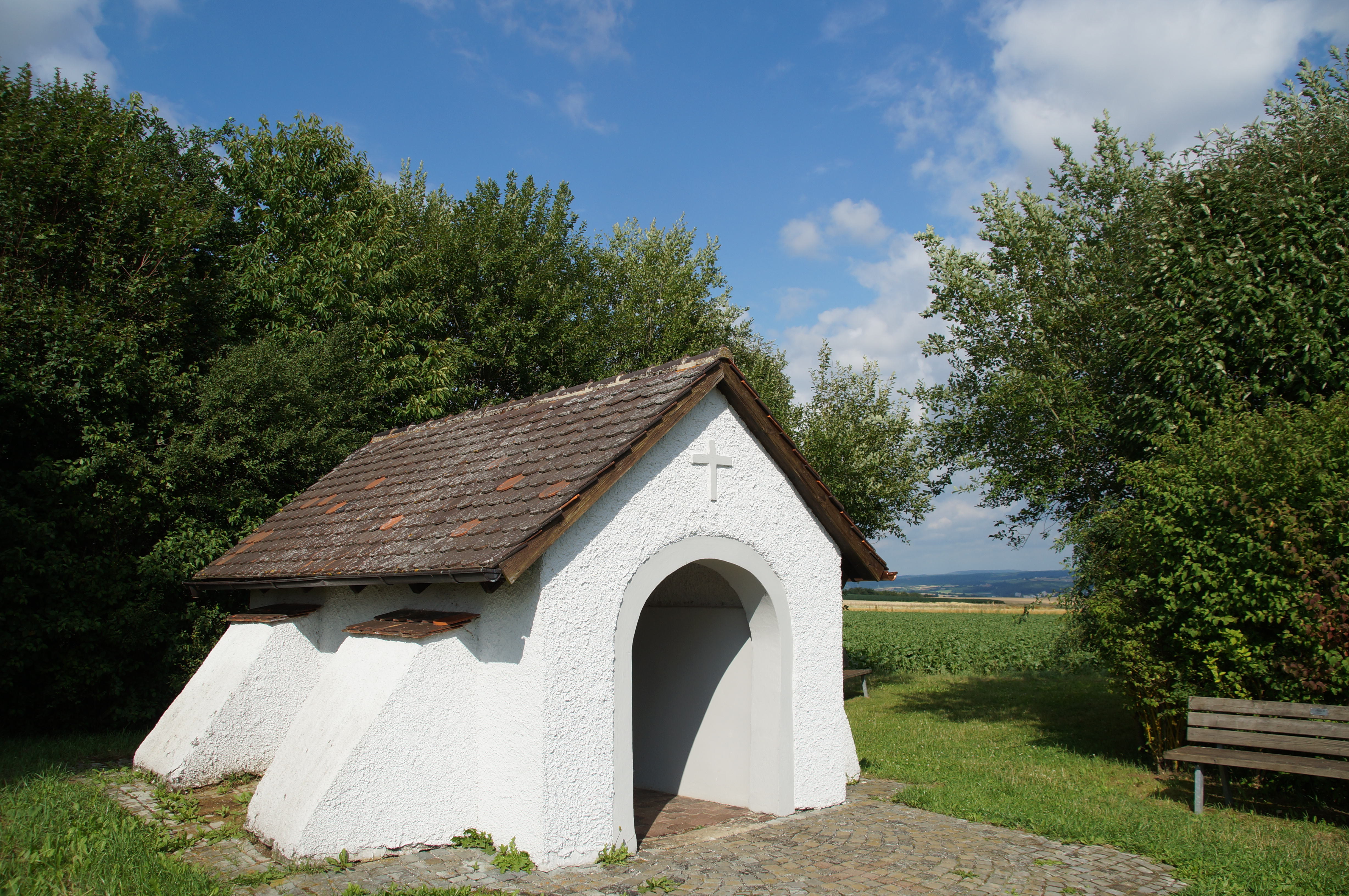 Feld- und Wallfahrtskapelle Maria Tanner in Oberwinzer Käferloh, Satteldachbau mit korbbogiger Öffnung, 1713 This is a photograph of an architectural monument.